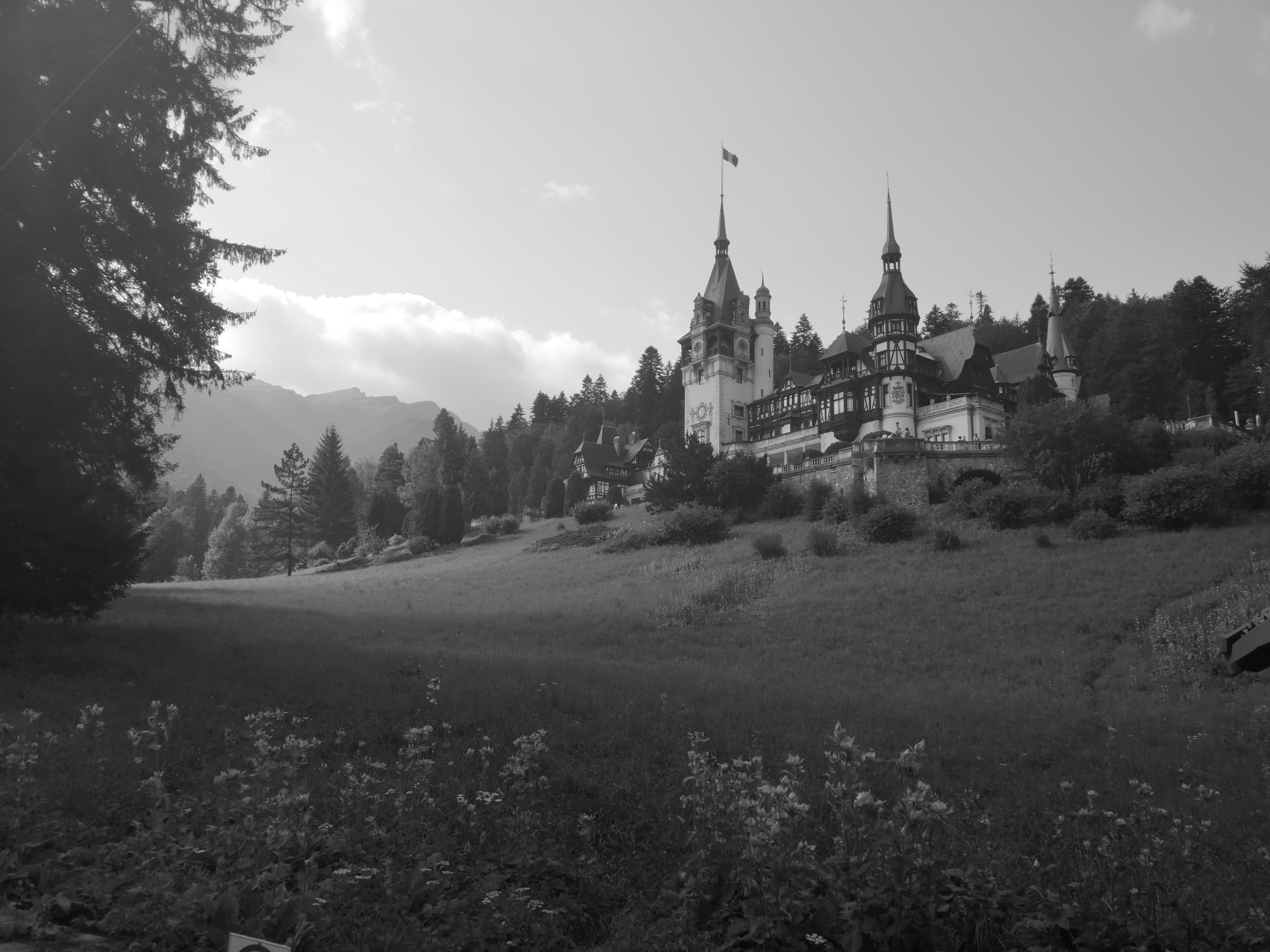 Castelul Peles fotografiat cu un senzor monocrom - 2018 01